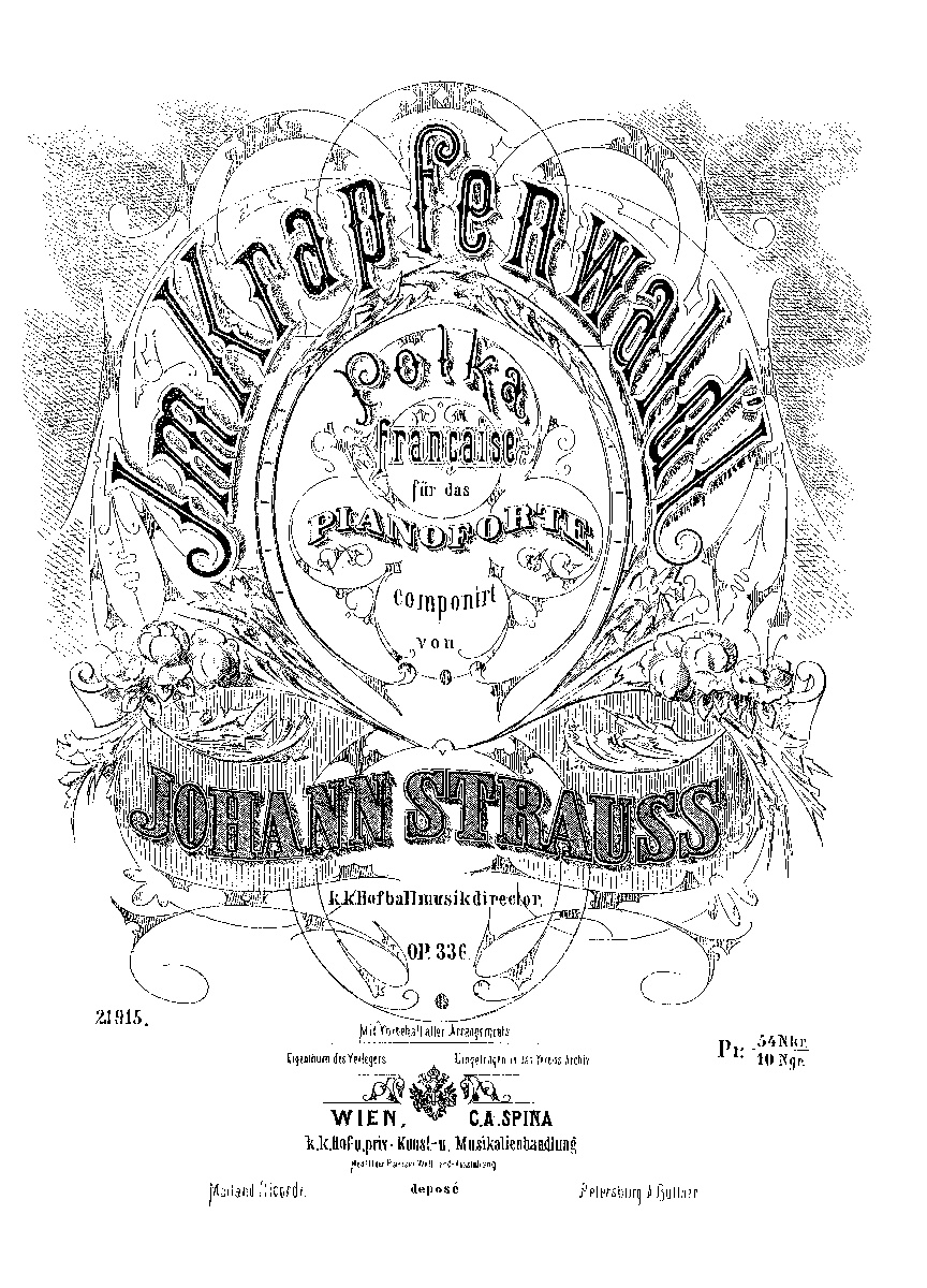 ポルカ『クラップフェンの森で』